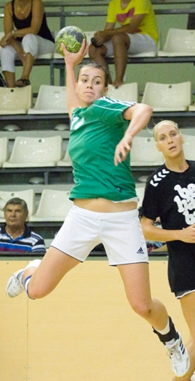 Nadine Schatzl